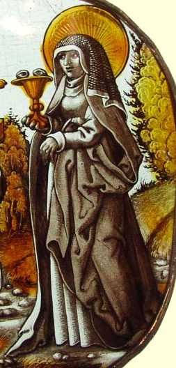 St. Odilia, Patronin des Elsass, Glasmalerei um 1500